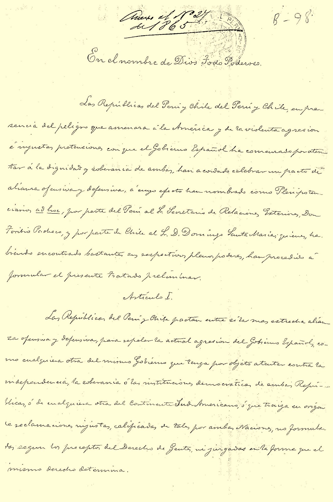 Extracto del documento del Tratado de alianza defensiva y ofensiva entre Perú y Chile (1865).